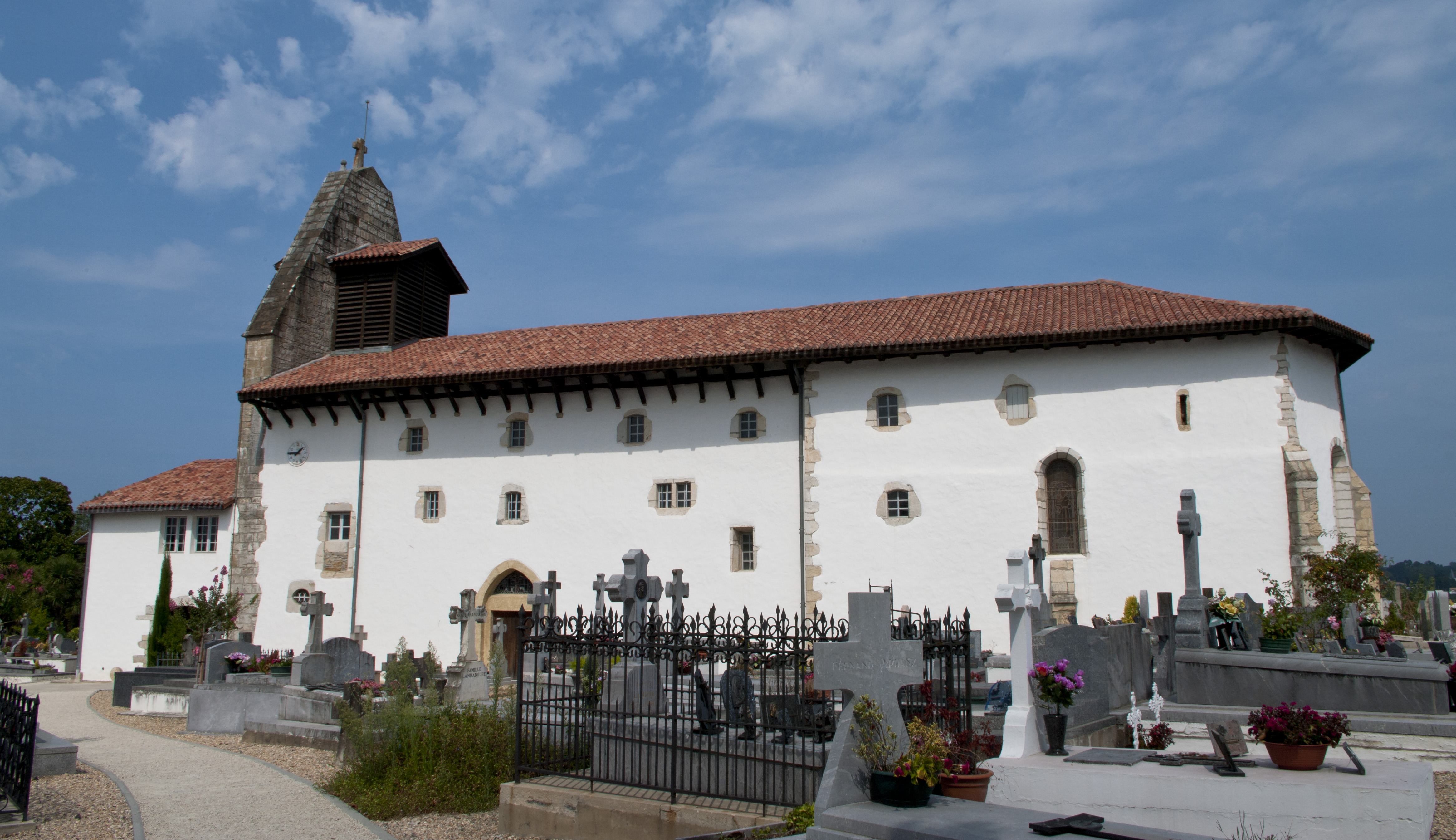 L'église Saint-Laurent est un lieu de culte catholique situé dans la commune de Arbonne, dans le département français des Pyrénées-Atlantiques. .